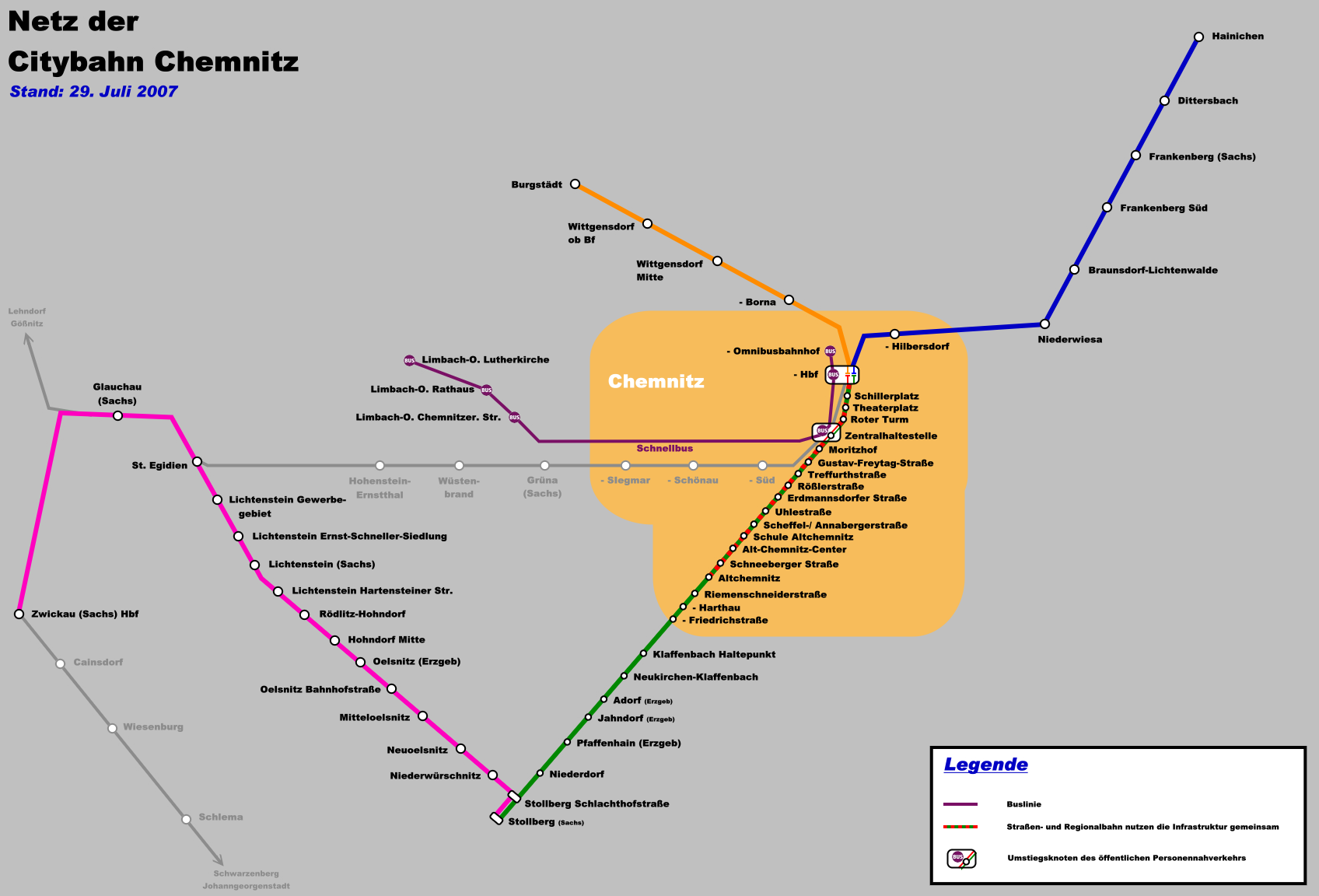 Das Streckennetz der City-Bahn Chemnitz mit der Pilotstrecke nach Stollberg. Netz der CityBahn Chemnitz.